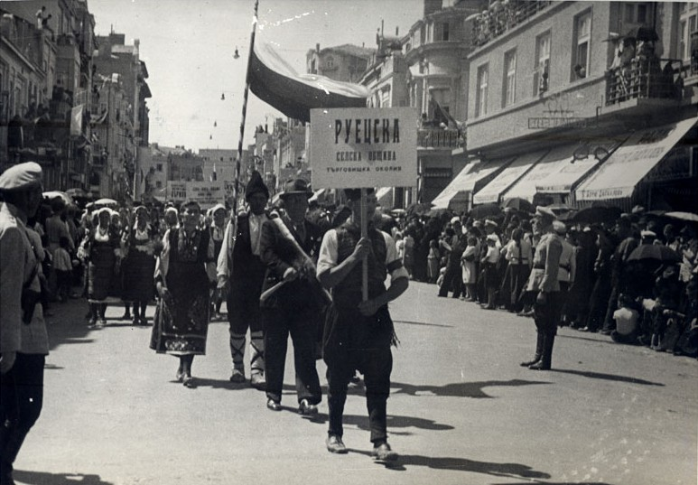 4-ти селскостопански културен и национален събор, 28 - 29 август 1938 г., гр. Варна. Парад на участниците в събора по ул. Княз Борис І. На преден план са представителите на община Руец, Търговище.